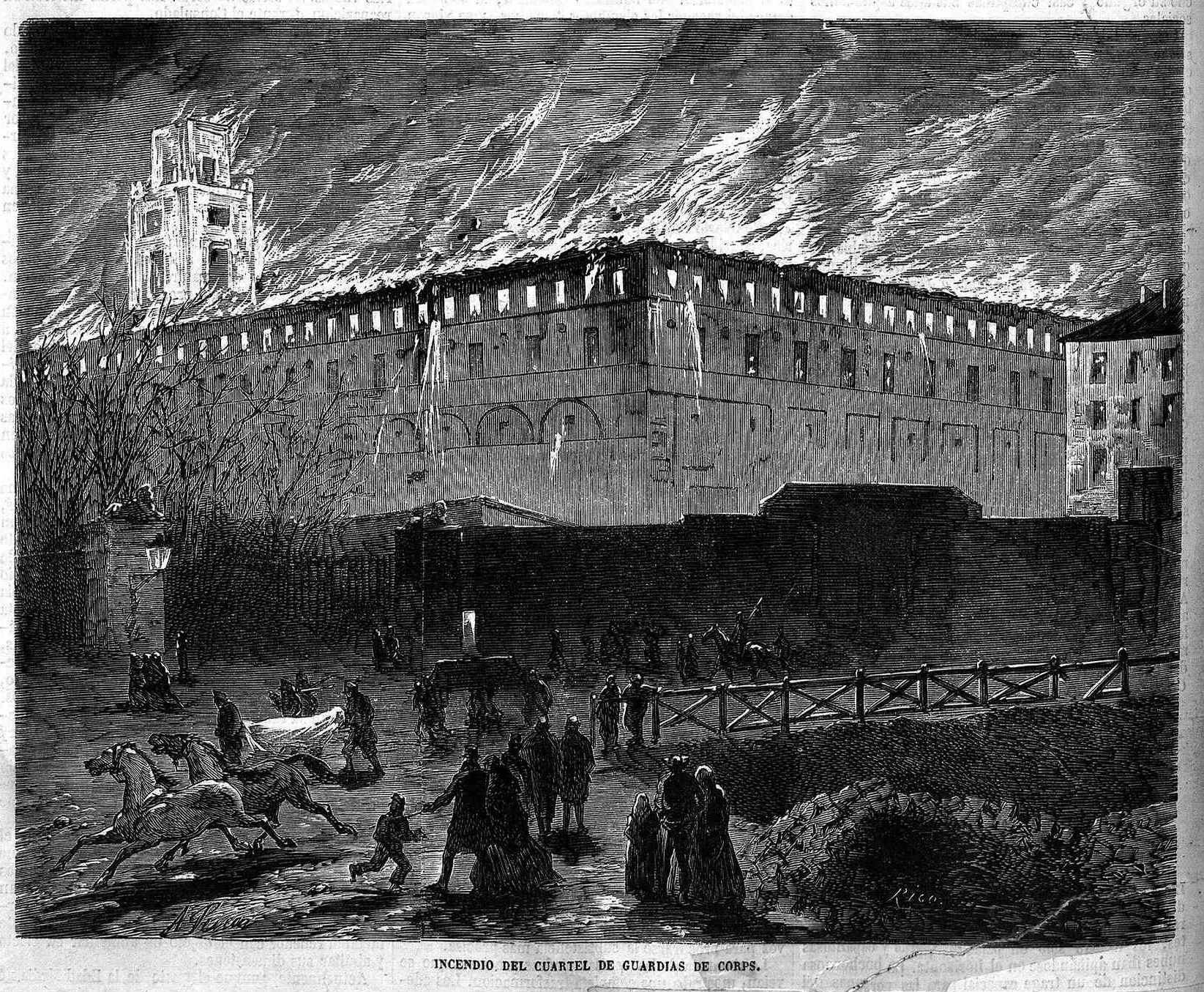 «Incendio del cuartel de Guardias de Corps», en la revista española El Museo Universal.